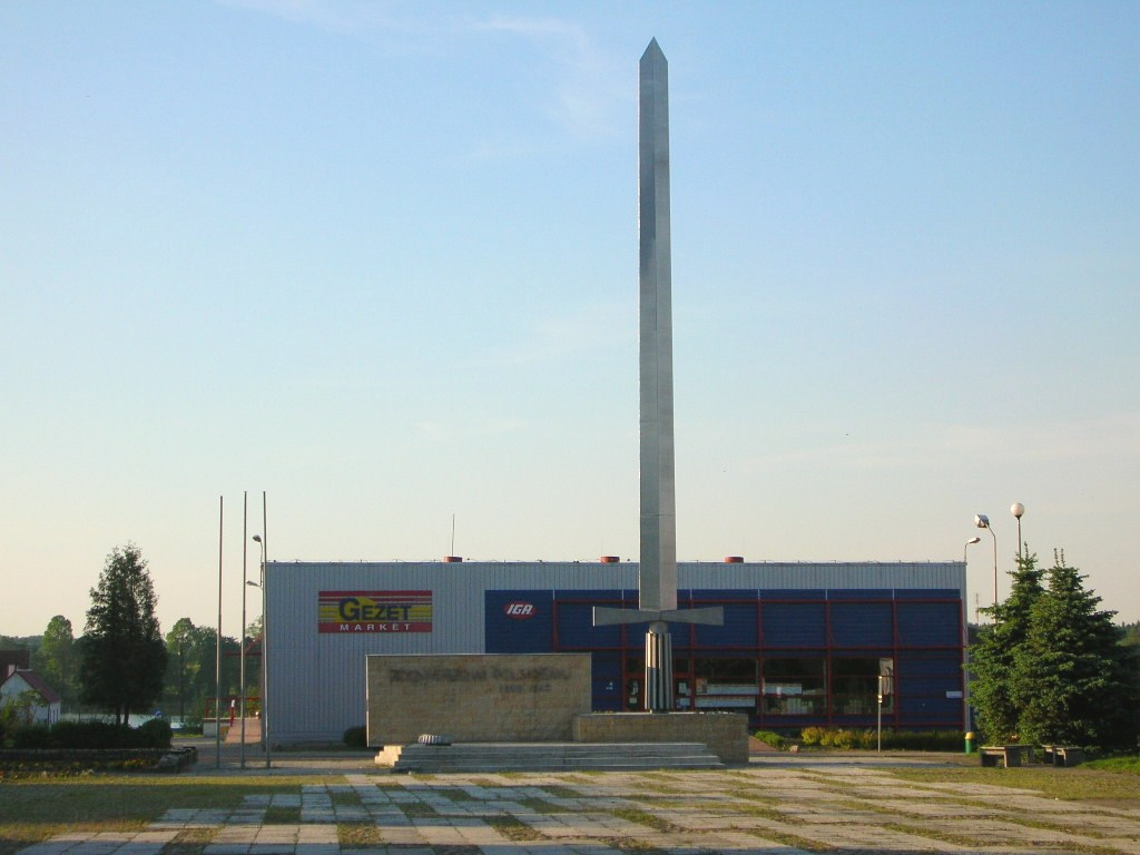 Dobiegniew - Pomnik Czynu Żołnierskiego na dobiegniewskim rynku